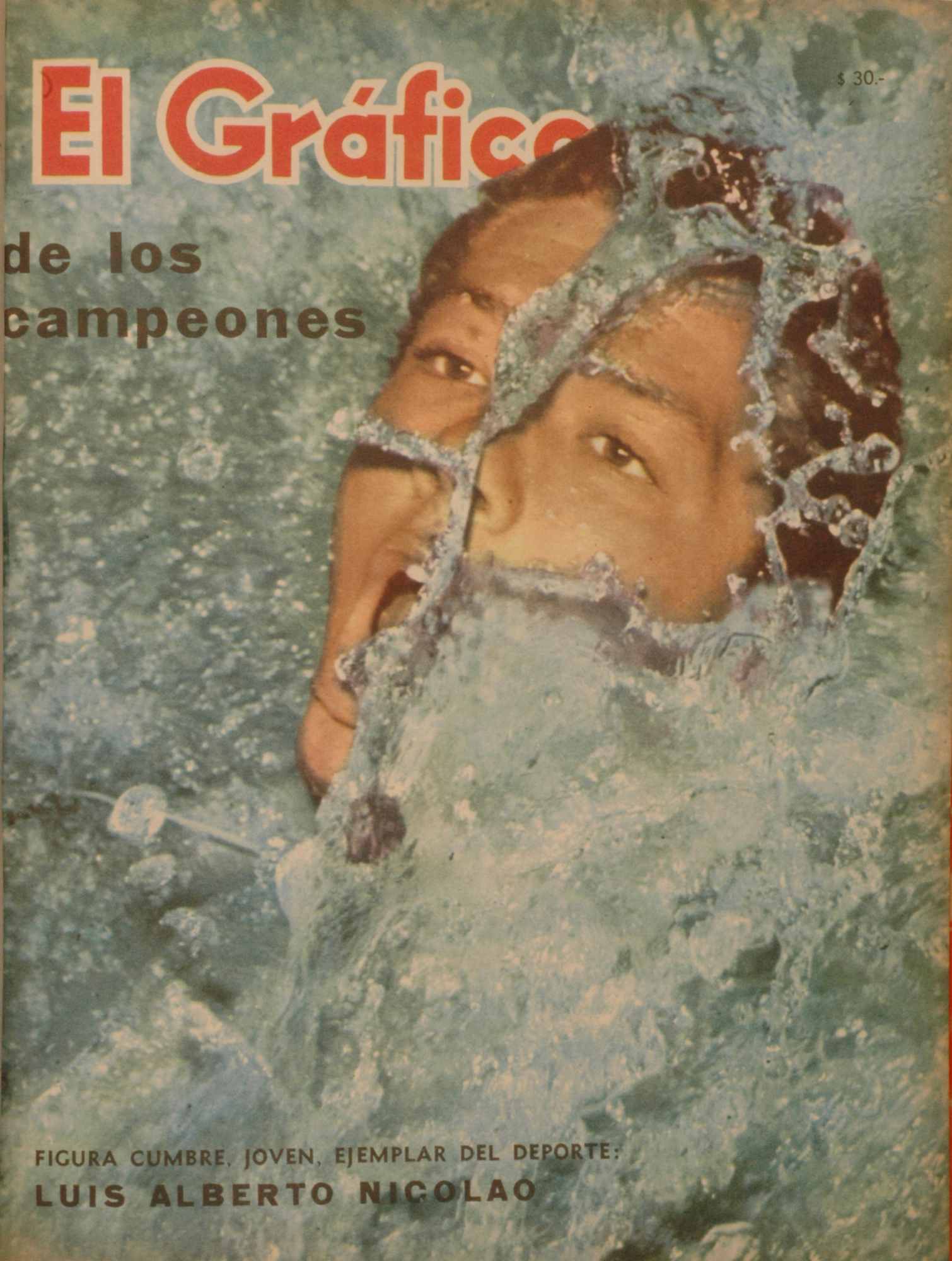 El Grafico del 23 de Enero de 1963. Edicion 2259